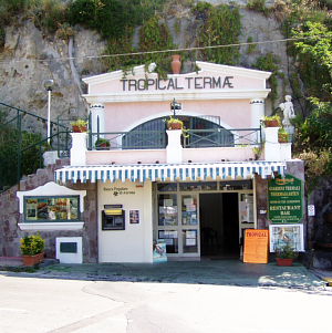 Vstup do jedněch z mnoha termálních lázní na ostrově Ischia